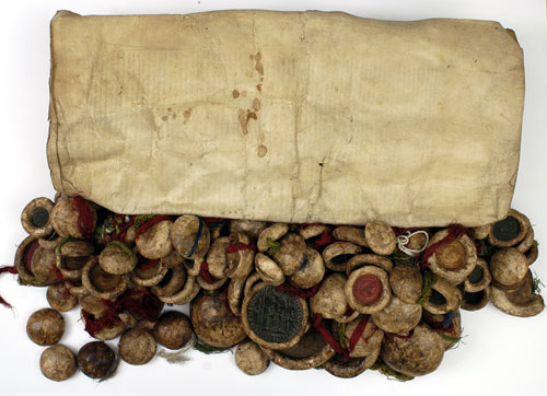 Pokój brzeski między Zakonem Krzyżackim a Polską i Litwą z dnia 31 XII 1435 roku